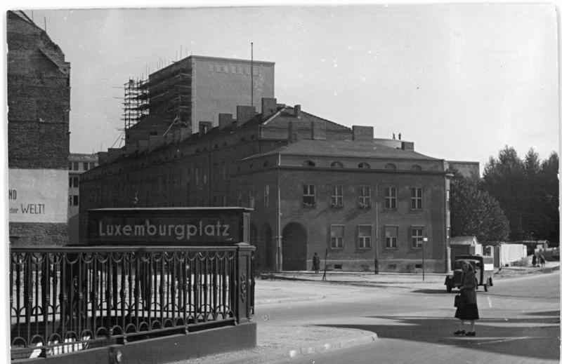 Berlin, Luxemburgplatz, U-Bahnhof Illus Köhler 26.9.1951 Berlin 1951 UBz: Luxemburgplatz, im Hintergrund der Bau der Volksbühne.